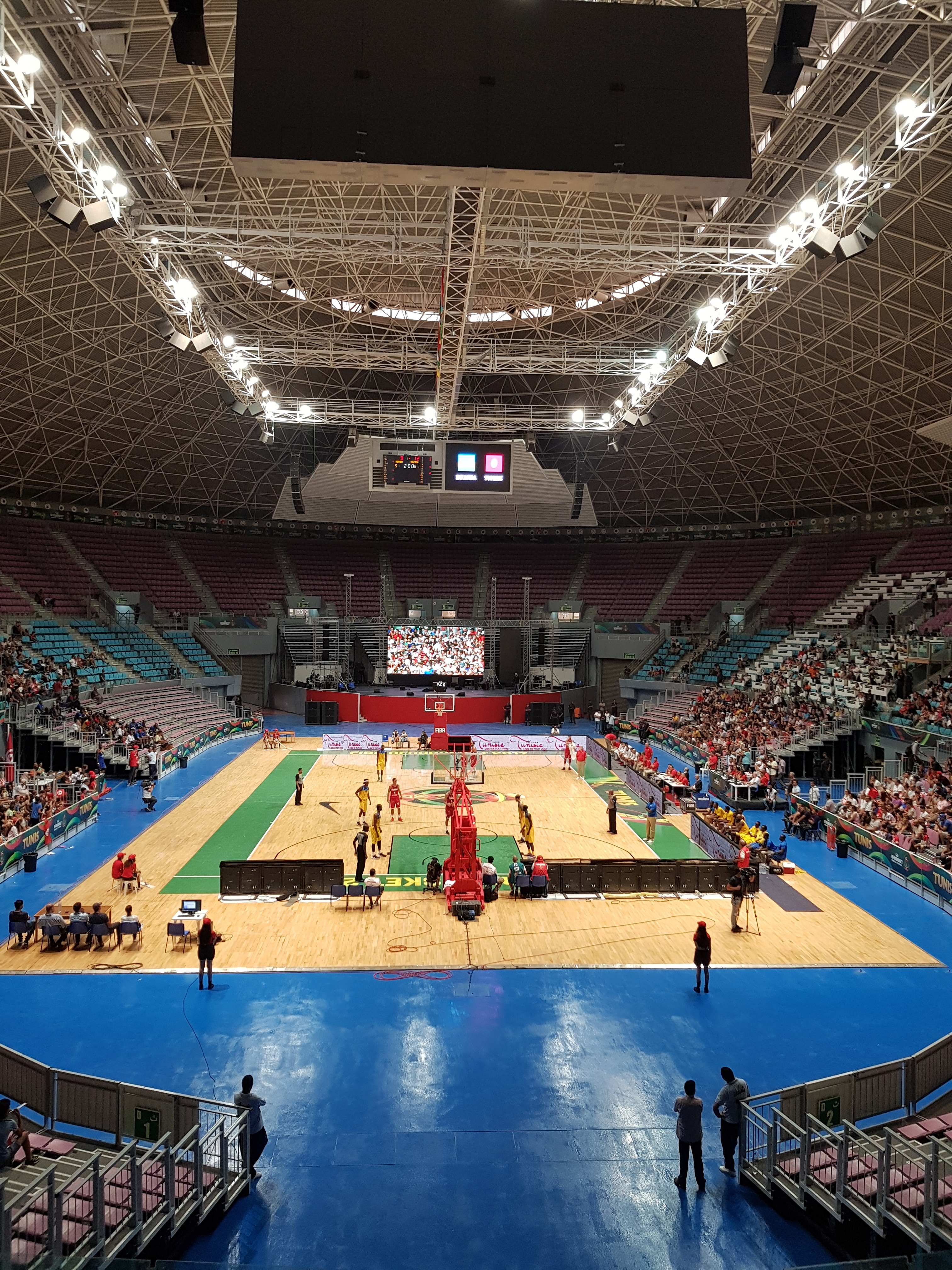 salle omnisports de Rades